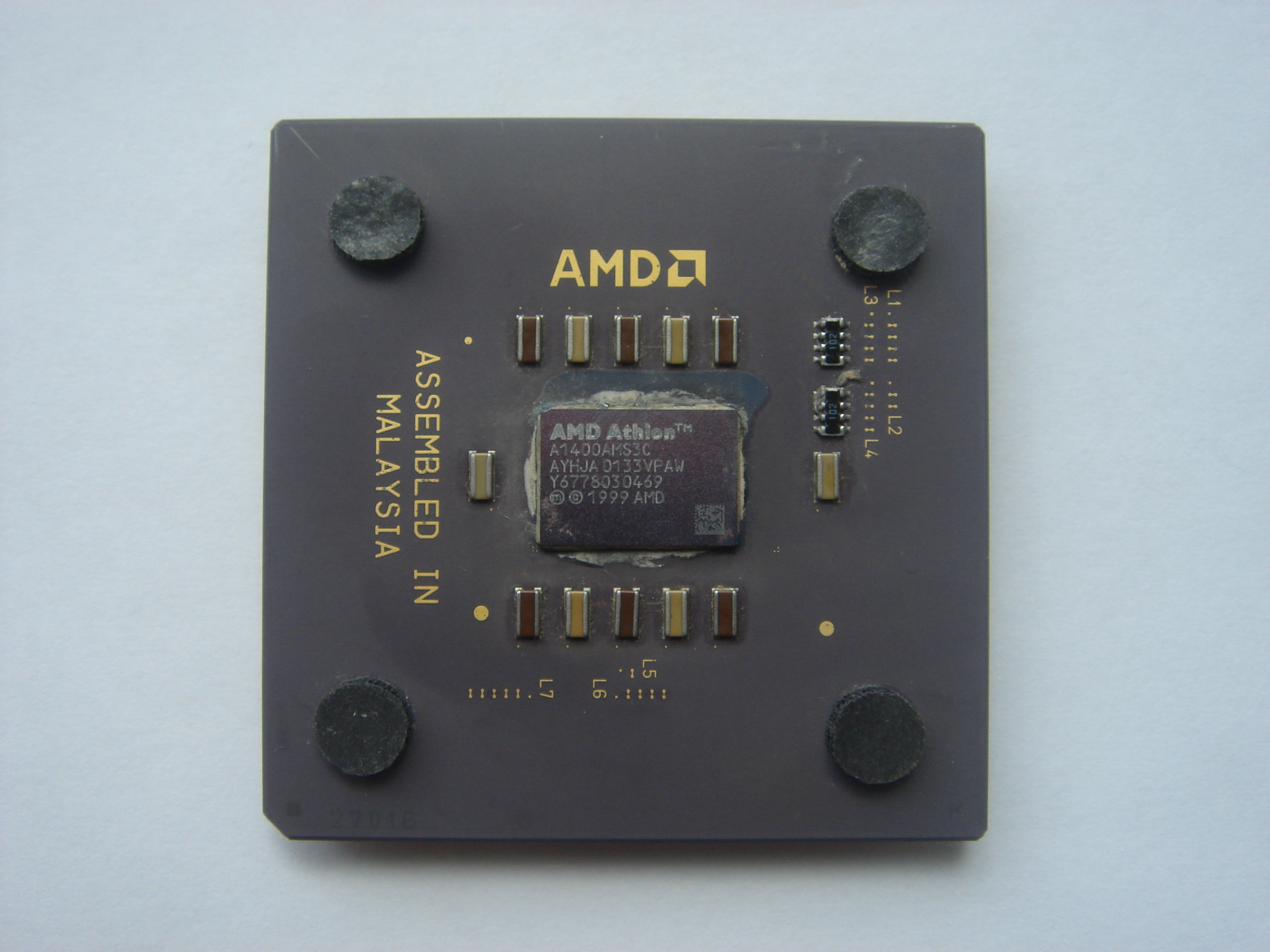 Athlon Thunderbird 1400